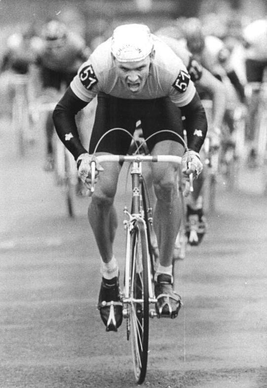 Uwe Ampler ADN-ZB Kasper 21.5.87 Polen: 40. Internationale Friedensfahrt-12. Etappe von Legnica nach Wreclaw über 180 km-Der 22jährige Weltmeister und Träger des Gelben Trikots des Spitzenreiters der Gesamt-Einzelwertung, Uwe Ampler (DDR), erkämpft sich weitere sieben Punkte als Erster der Bergwertung ind Sokolec (km 73). Auch die zweite Bergwertung dieser Etappe und damit die Letzte der diesjährigen Tour nach dem Leipziger DHfK-Sportler ganz vorn. Er ist somit "Bergkönig" der "40." und im Besitz des Grünen Trikots.